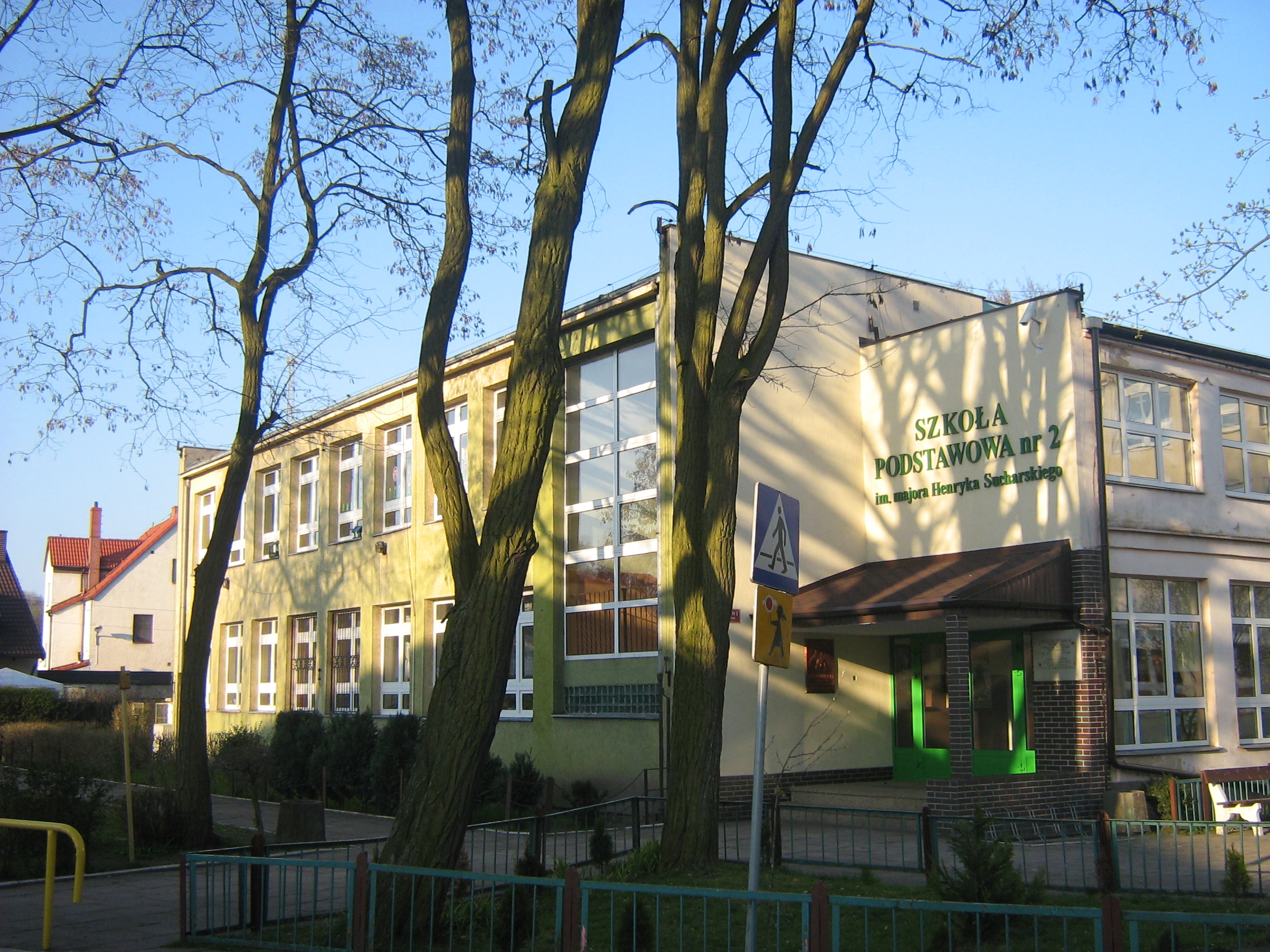 Szkoła Podstawowa nr 2 w Świnoujściu-Warszowie